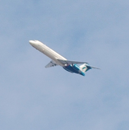 Is it a Boeing 717? An MD-80?